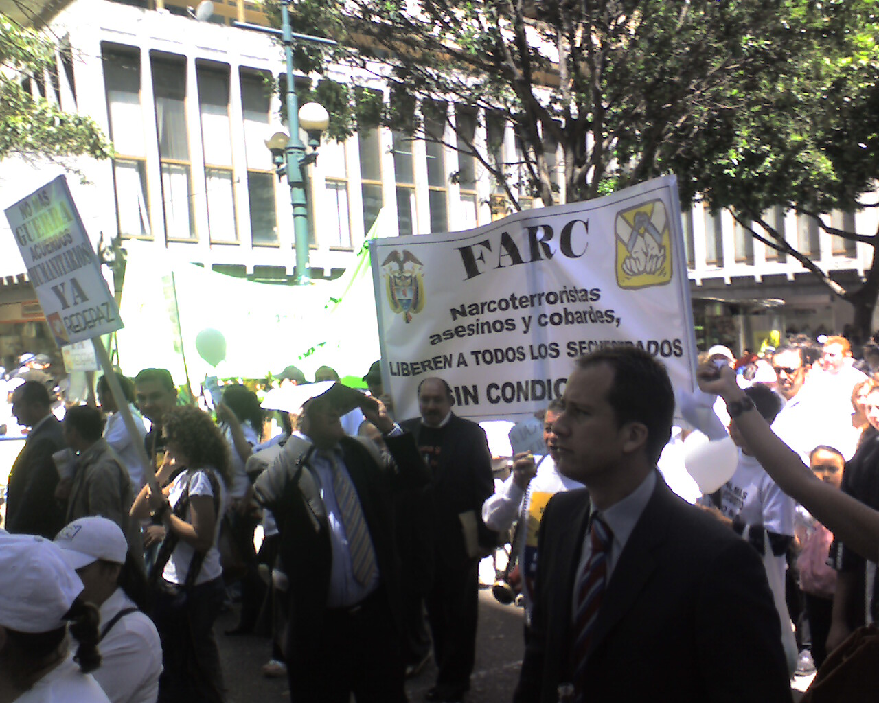 Foto: Germán Cabrejo, especial para equinoXio